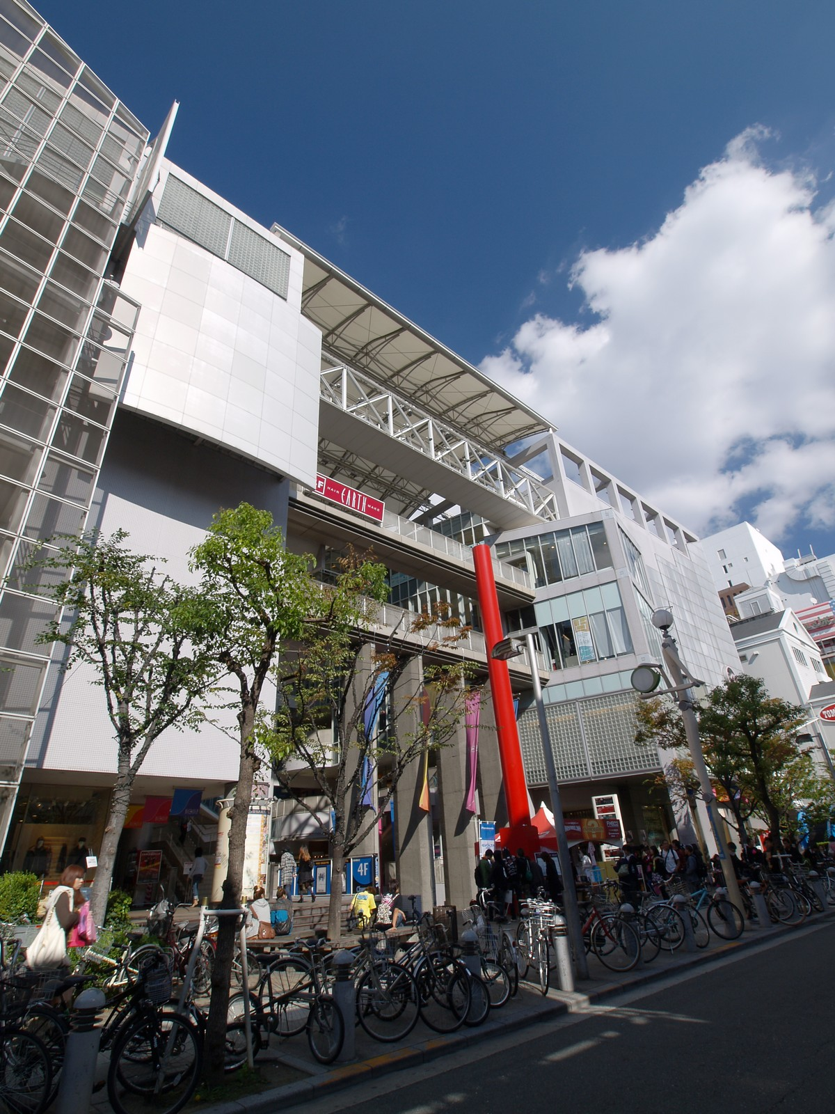 BIG STEP （アメリカ村にある）各種テナント店舗のほか、ライブハウス「BIG CAT」、アジア映画専門館の「シネマート心斎橋」、スポーツクラブがある。所在地：大阪府大阪市中央区西心斎橋1-6-14。Category:中央区 (大阪市)の画像